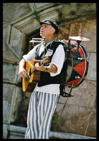 MikeMarriott